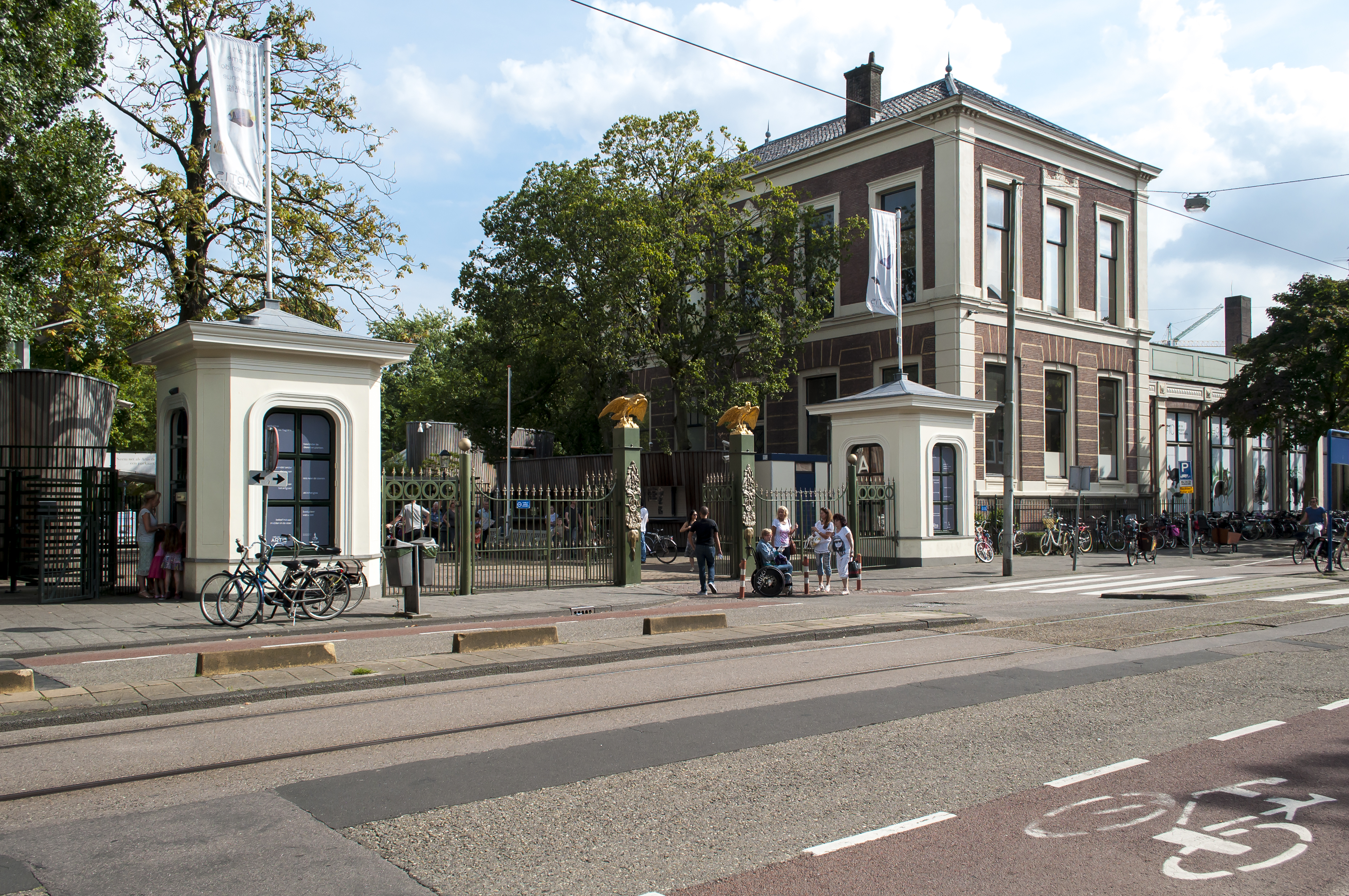 Artis, Amsterdam, IngangsHek en Kiosken. Twee vierkante Kiosken waartussen Hek met door vergulde adelaars bekroonde pijlers.